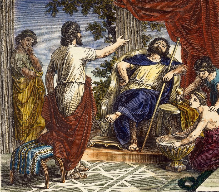 Dion führt Platon bei Dionys ein Platon; griech. Philosoph; Athen 427 v.Chr. - ebd. 347 v.Chr. - 'Dion führt Platon bei Dionys ein'. - (Um 390 v.Chr.; Platon am Hofe des Tyrannen Dionysius in Syrakus). Holzstich, unbez., spätere Kolorierung. Aus: Hermann Göll, Die Weisen und Ge- lehrten des Alterthums, Leipzig (Otto Spamer) 1876, S.89. Berlin, Slg.Archiv f.Kunst & Geschichte.